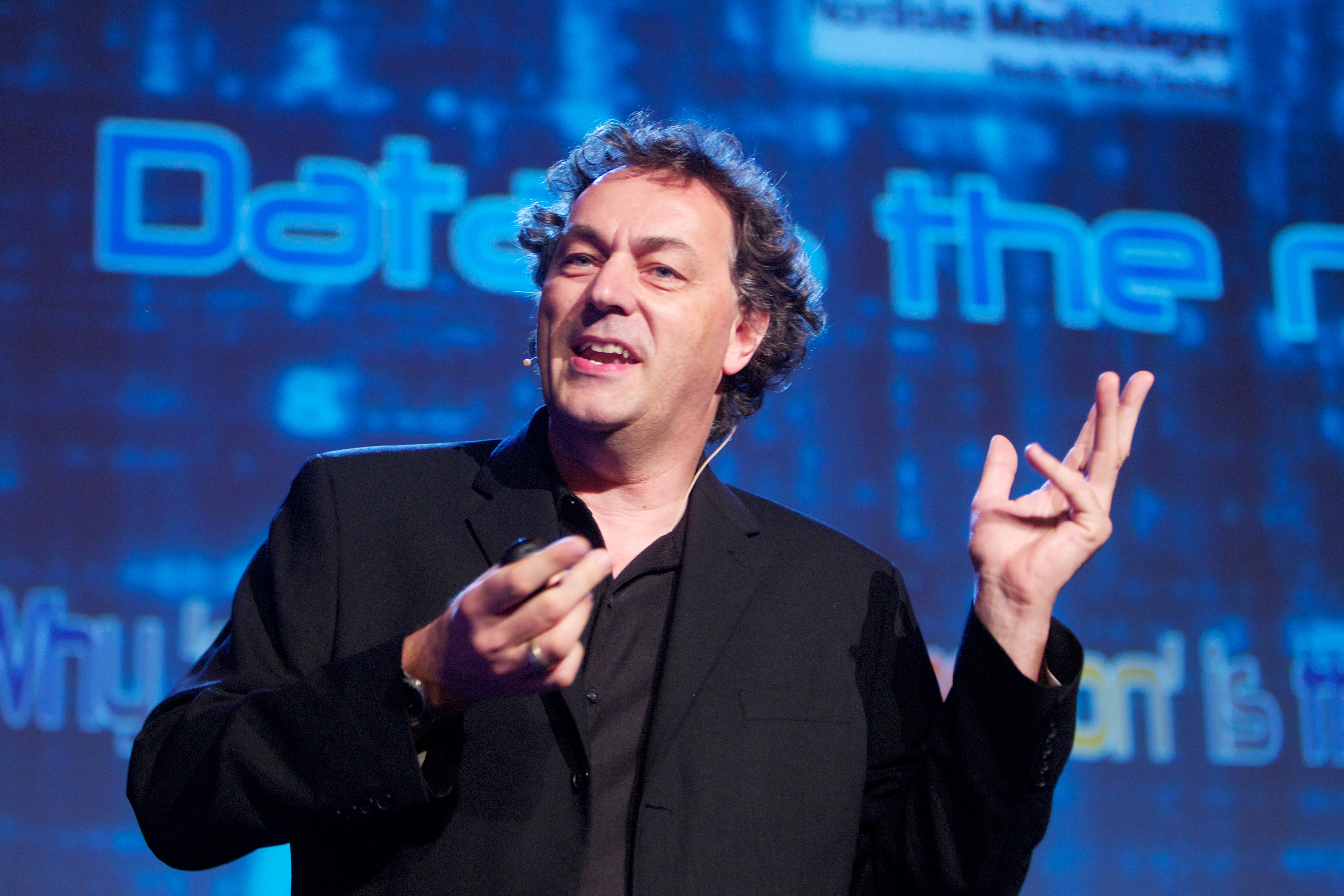 Bergen, 20110512. Nordiske Mediedager. Torsdag. Gerd Leonhard. Foto: Eirik Helland Urke